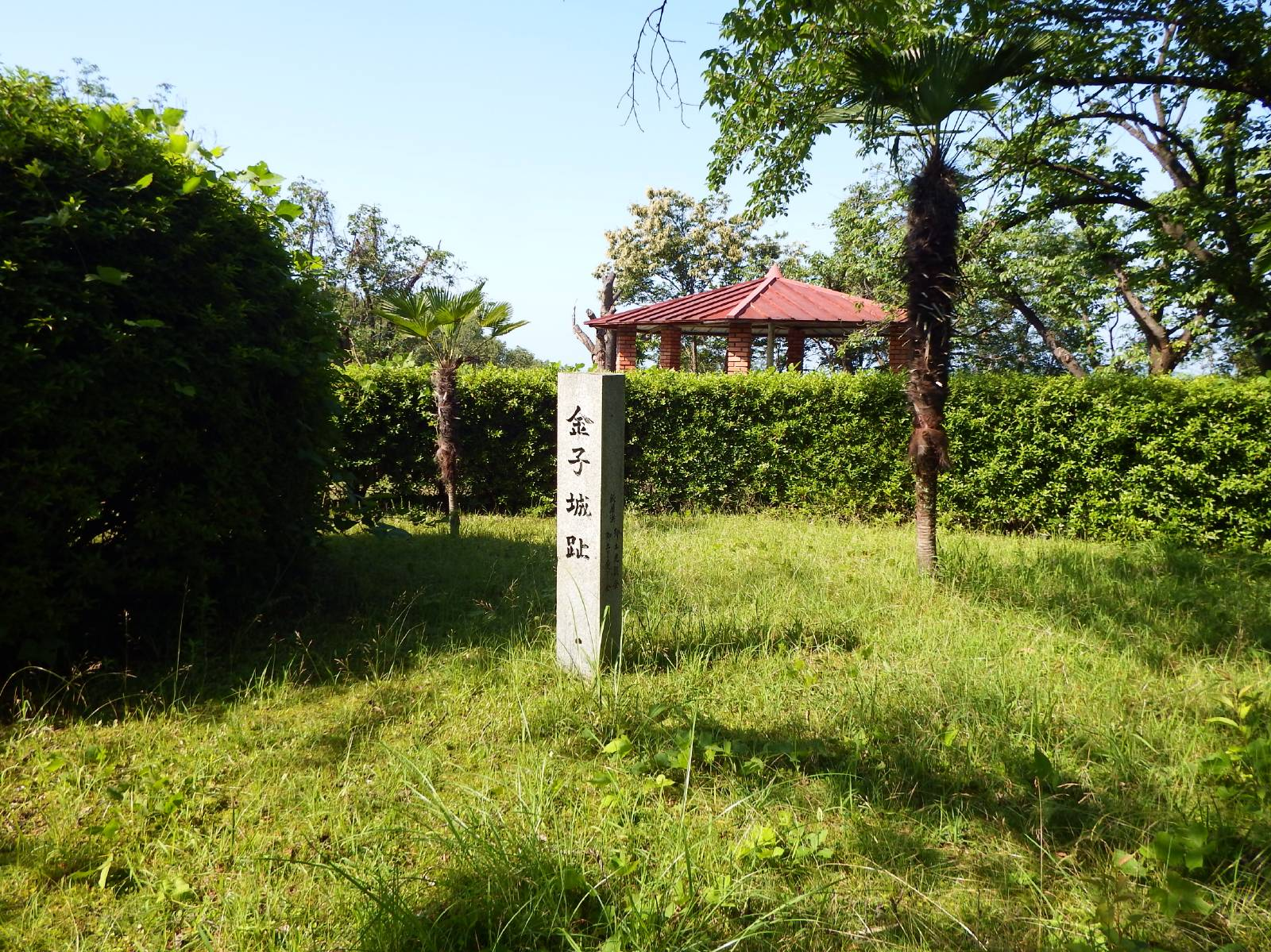 新居浜市の金子城跡